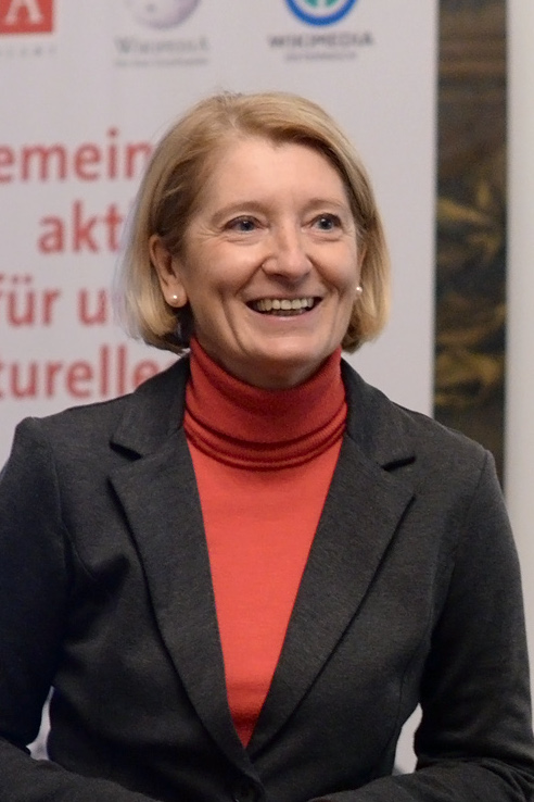 Barbara Neubauer, Präsidentin des österreichischen Bundesdenkmalamtes